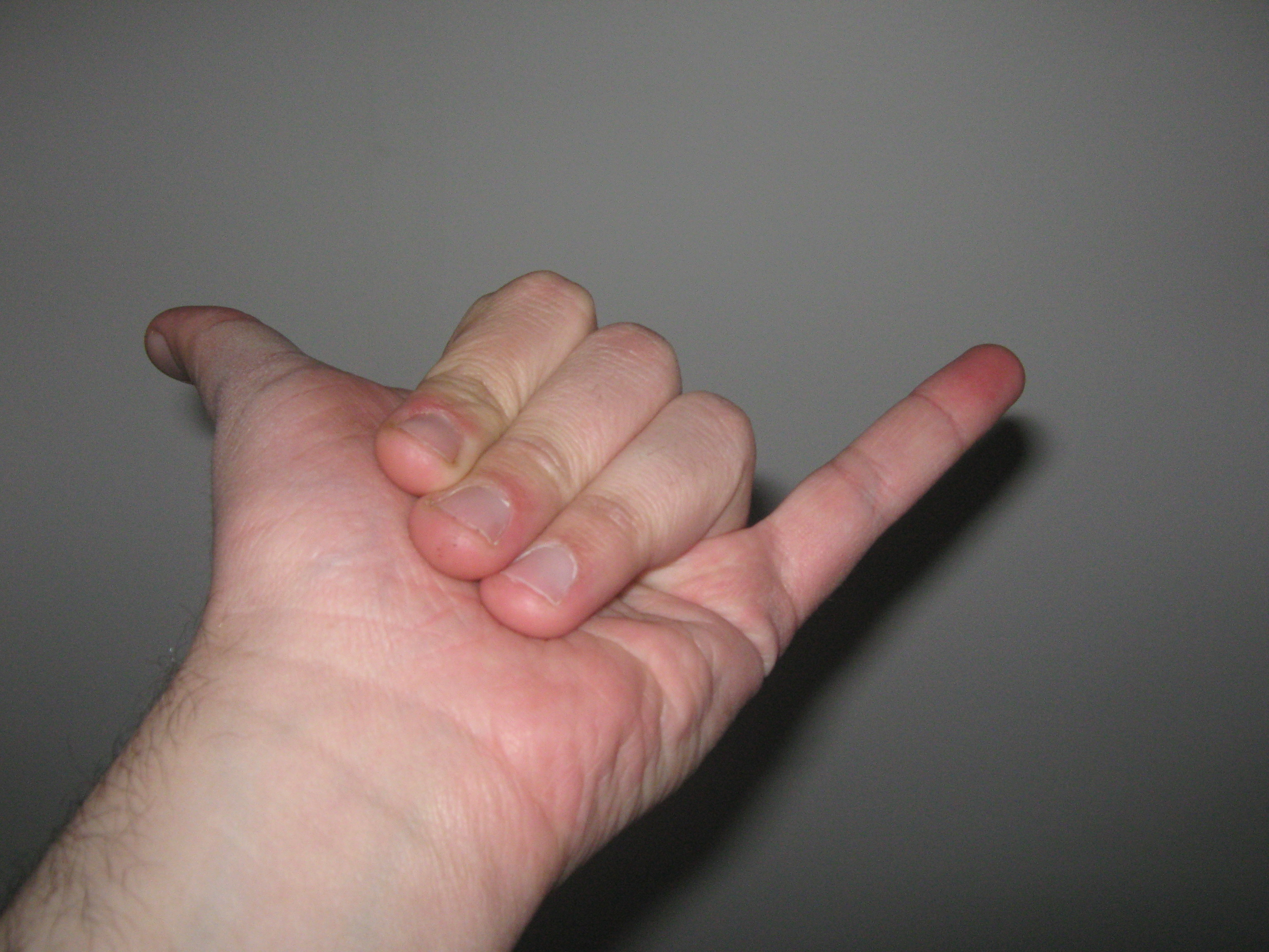 תיאור הhe:קמיצה בhe:קורבן מנחה